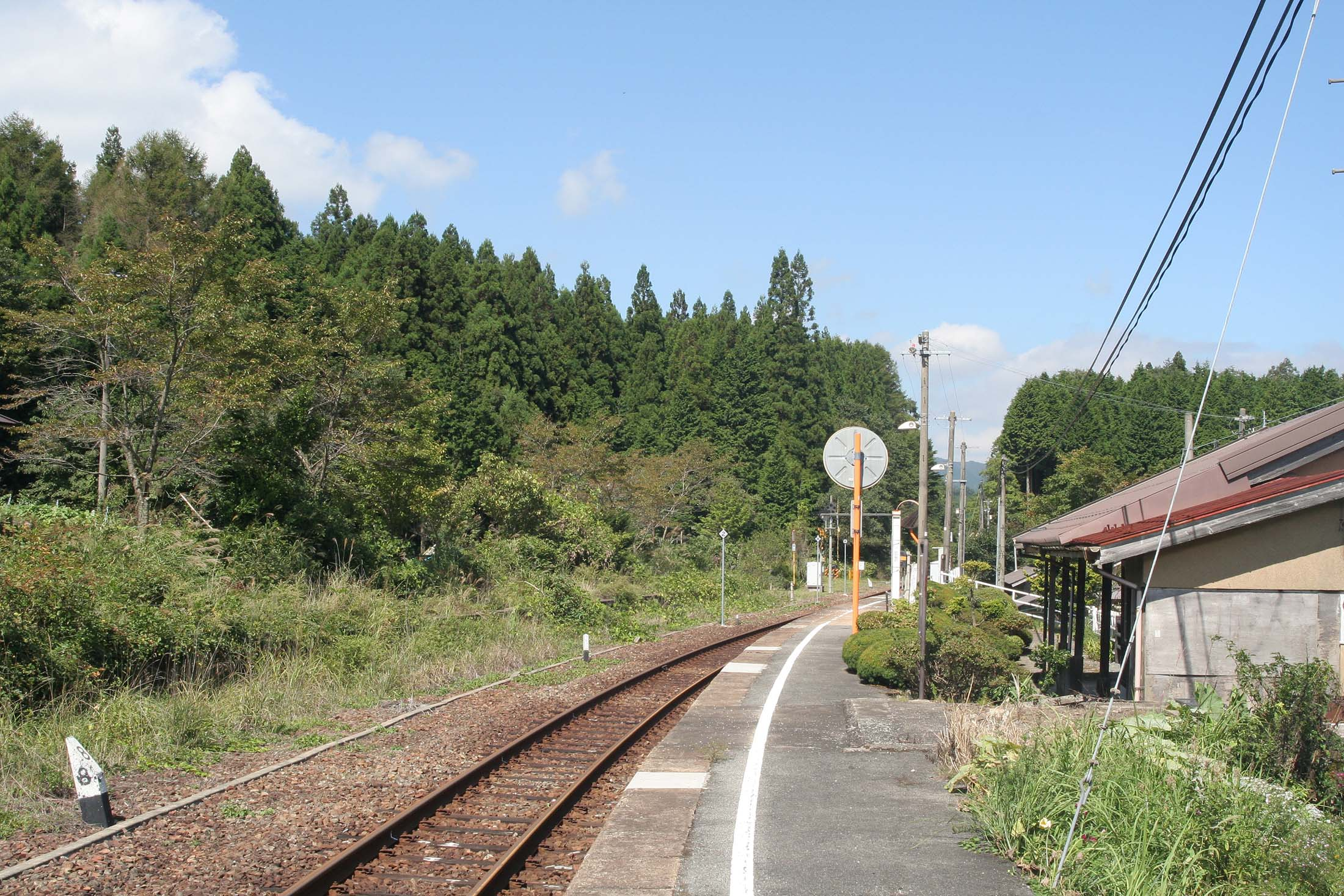 西日本旅客鉄道 道後山駅の構内